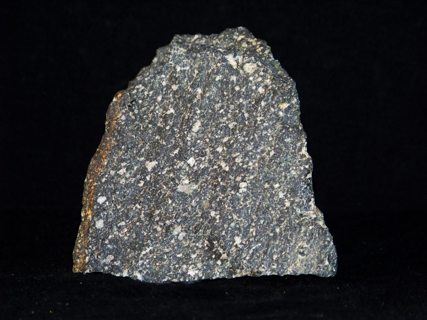 Porfir bezkwarcowy, zielony. Kamieniołom Zalas, okolice Krakowa, woj. Małopolskie. Polska